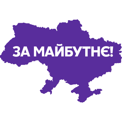 Логотип депутатської групи "За майбутнє" у Верховній Раді України IX скликання